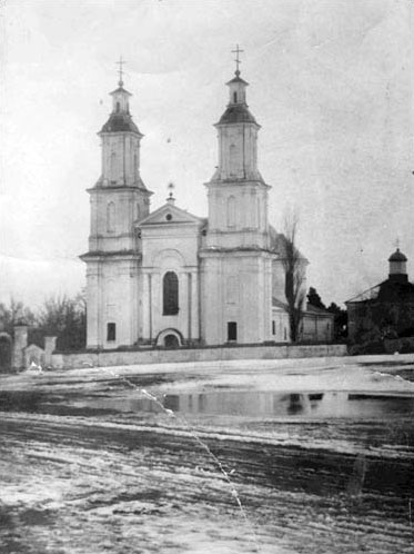 Беларуская (тарашкевіца): Быцень (Bycień), пляц Рынак (plac Rynak). Царква Сьвятога Язафата і манастыр базылянаў